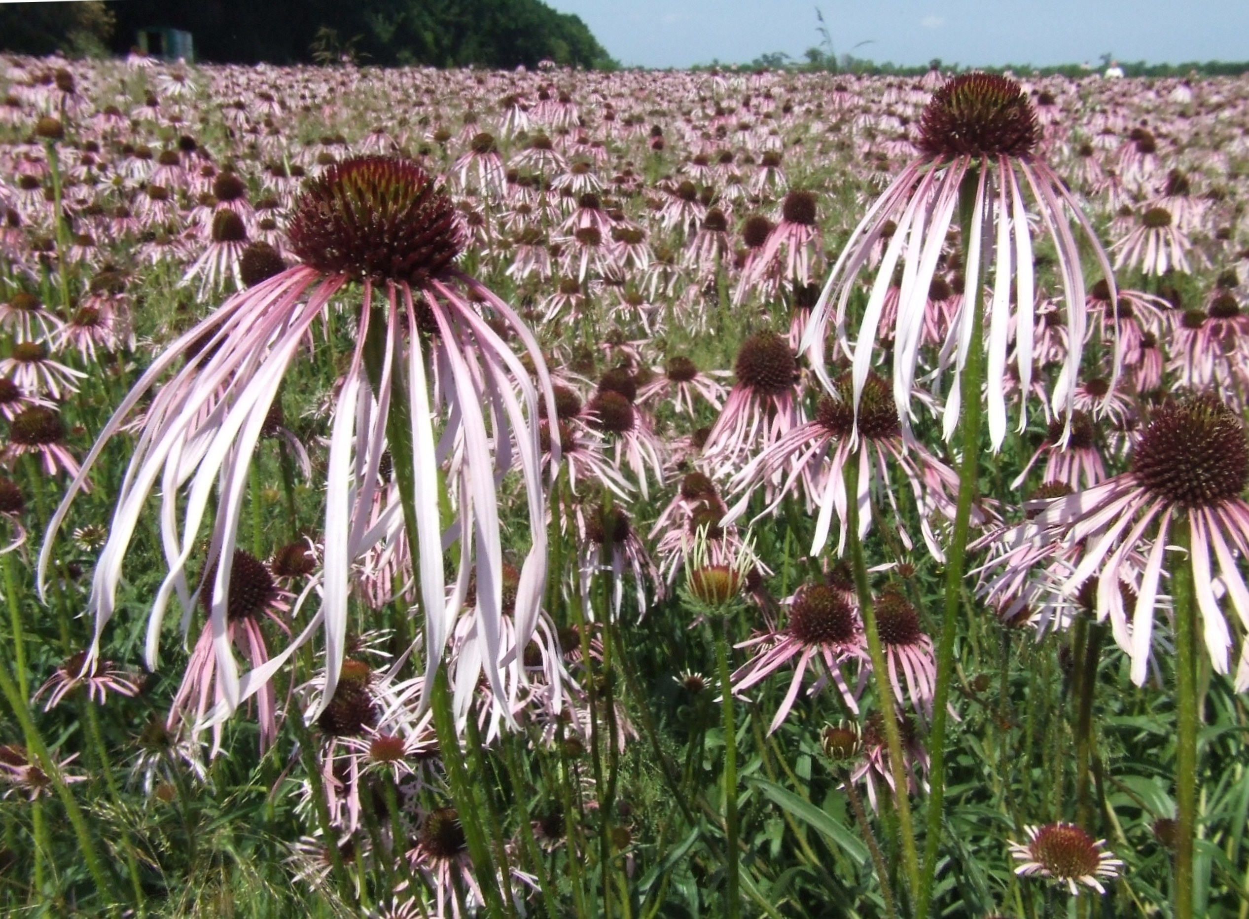 На плантации эхинацеи бледной в Полтавской области, Украина